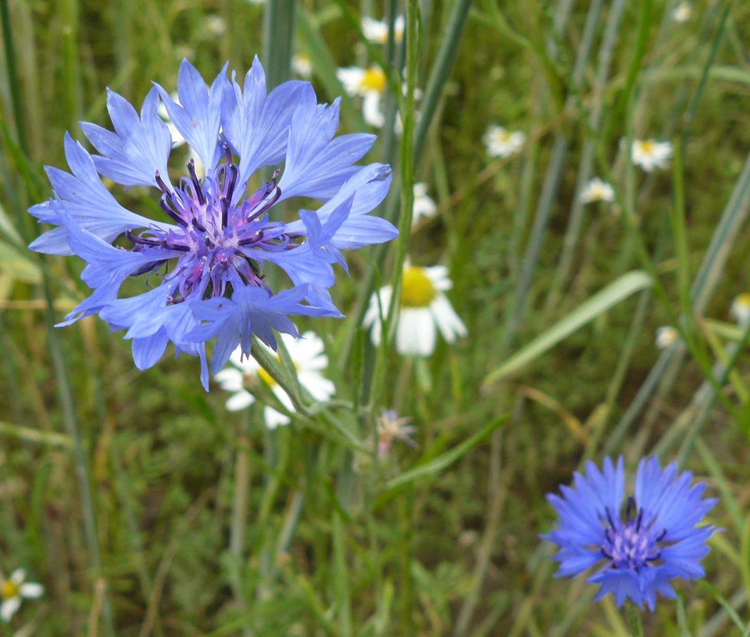 Chabry bławatki koło Kicina w Puszczy Zielonce.